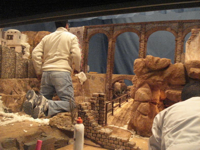 Montaje del Belén Municipal de Aspe (Alicante), elaborado por la Asociación de Belenistas.